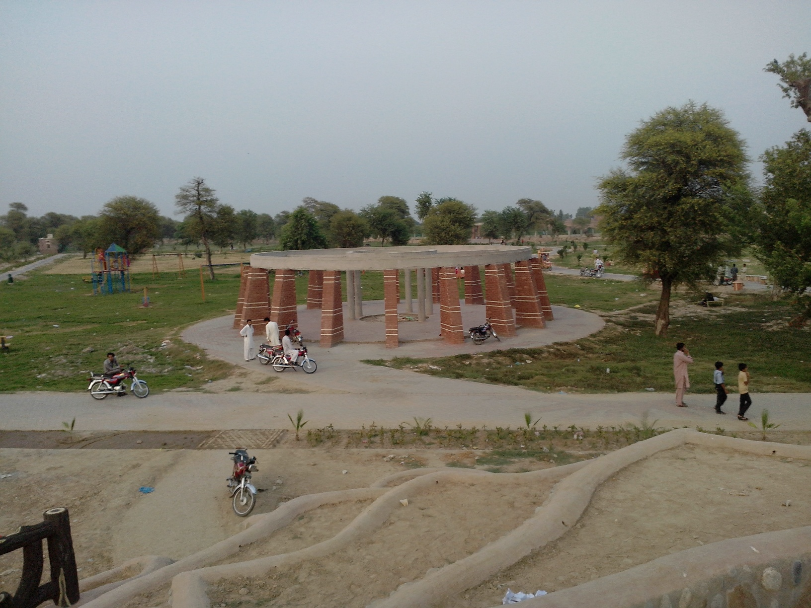 Okara Public Park, Okara